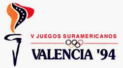 Logo oficial V Juegos Suramericanos Valencia1994. Diseñado por el Artista Gráfico Carlos Apitz (Diseñarte/WMC Link Comunicaciones) para Fundadeporte, Gobernación Edo. Carabobo, Venezuela, Como parte de una campaña que incluían la mascota, señalización, material promocional y publicitario. El logo representa la antorcha olímpica; la llama es el mapa de Sudamérica, la base es la unión de la letra "C" de Carabobo y la "V" del número romano Quinto o cinco y de la ciudad de Valencia, cede de los juegos.